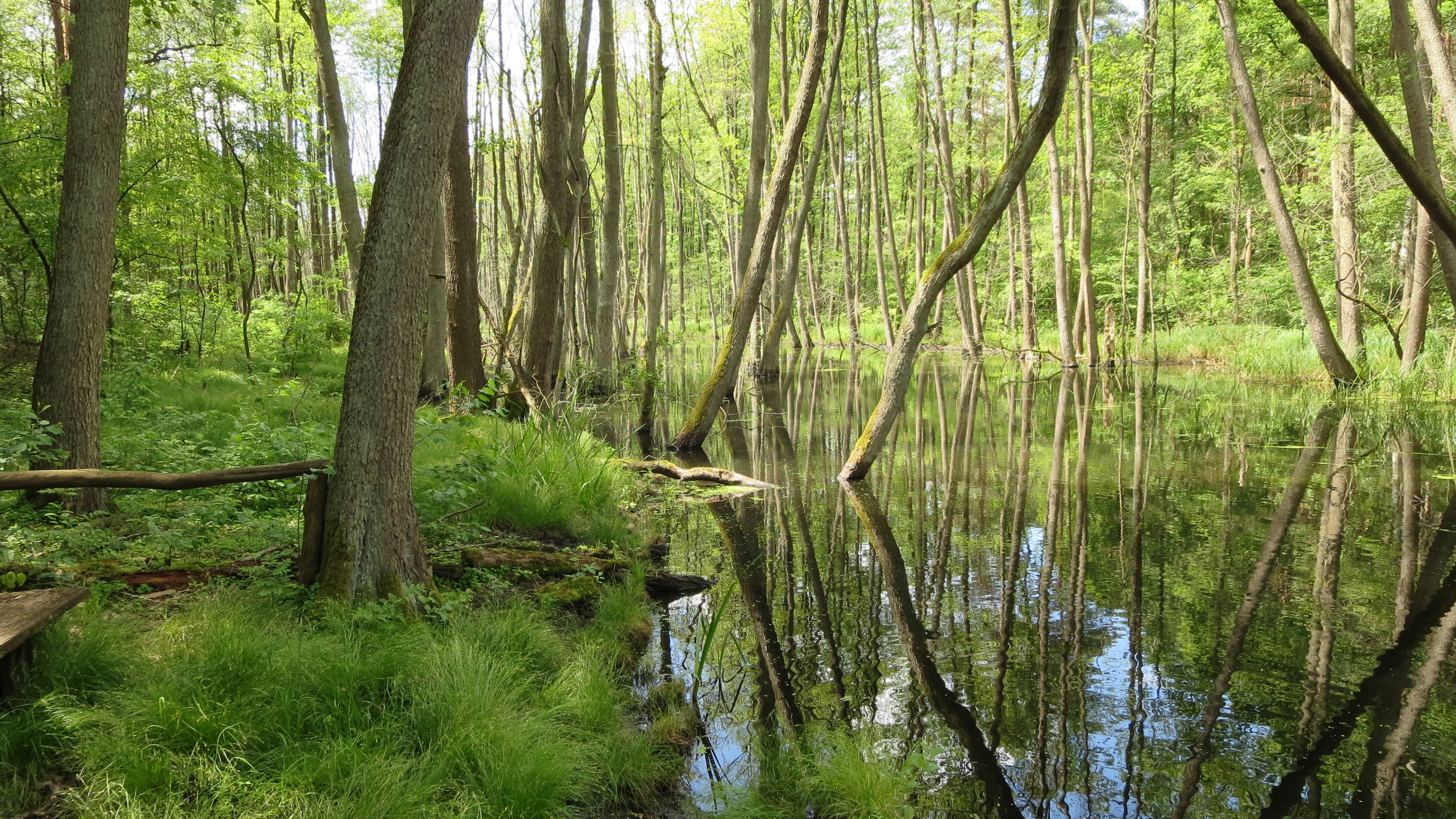 Briese im Briesetal